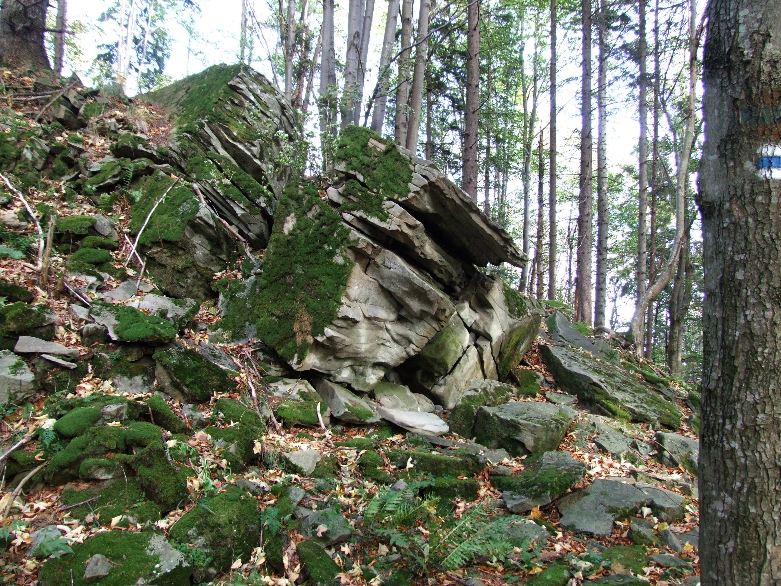 Wietrzne Dziury (Beskid Sądecki)